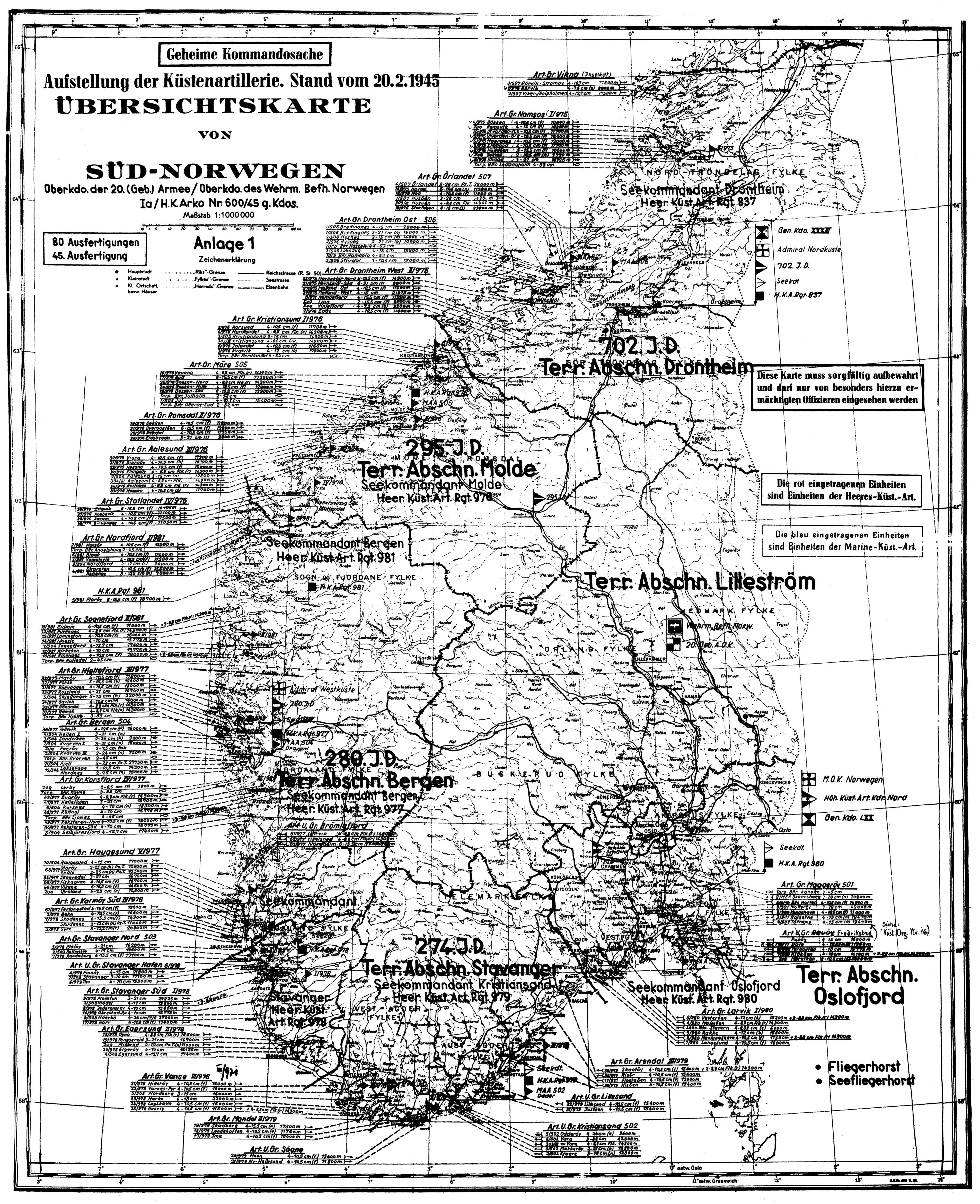 Wikipedia: Festung Norwegen Lenke / Link: Tyske kystfort i Norge Geheime Kommandosache Aufstellung der Küstenartillerie. Stand vom 20.2.1945 Übersichtskarte von Süd-Norwegen Oberkdo. der 20. (Geb.) Armee / Oberkdo. des Wehrm. Befh. Norwegen Ia / H. K. Arko Nr. 600/45 g. Kdos. Art. Gr. Viking (Inselkdt.) Art. Gr. Namsos (I/975) Art. Gr. Örlandet 507 Art. Gr. Drontheim Ost 506 Art. Gr. Drontheim West II/975 Art. Gr. Kristiansund I/976 Art. Gr. Möre 505 Art. Gr. Romsdal II/976 Art. Gr. Aalesund III/976 Art. Gr. Statlandet IV/976 Art. Gr. Nordfjord I/981 Art. Gr. Sognefjord II/981 Art. Gr. Hjeltefjord III/977 Art. Gr. Bergen 504 Art. Gr. Korsfjord IV/977 Art. Gr. Haugesund V/977 Art. Gr. Karmöy Süd IV/978 Art. Gr. Stavanger Nord 503 Art. U. Gr. Stavanger Hafen 6/978 Art. Gr. Stavanger Süd I/978 Art. Gr. Egersund II/978 Art. Gr. Vanse III/978 Art. Gr. Mandal II/979 Art. U. Gr. Sögne Art. U. Gr. Kristiansand 502 Art. U. Gr. Lillesand Art. Gr. Arendal III/979 Art. Gr. Larvik I/980 Art. U. Gr. Revöy Fredrikstad Art. Gr. Maageröy 501